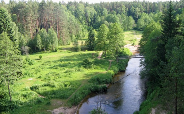 Autoriaus nuotrauka, 2005.06.23. Ūla nuo šlaito prie „Ūlos akies“ versmės, netoli Žiūrų kaimo. Nuotrauka gali būti platinama pagal GFDL licenciją.